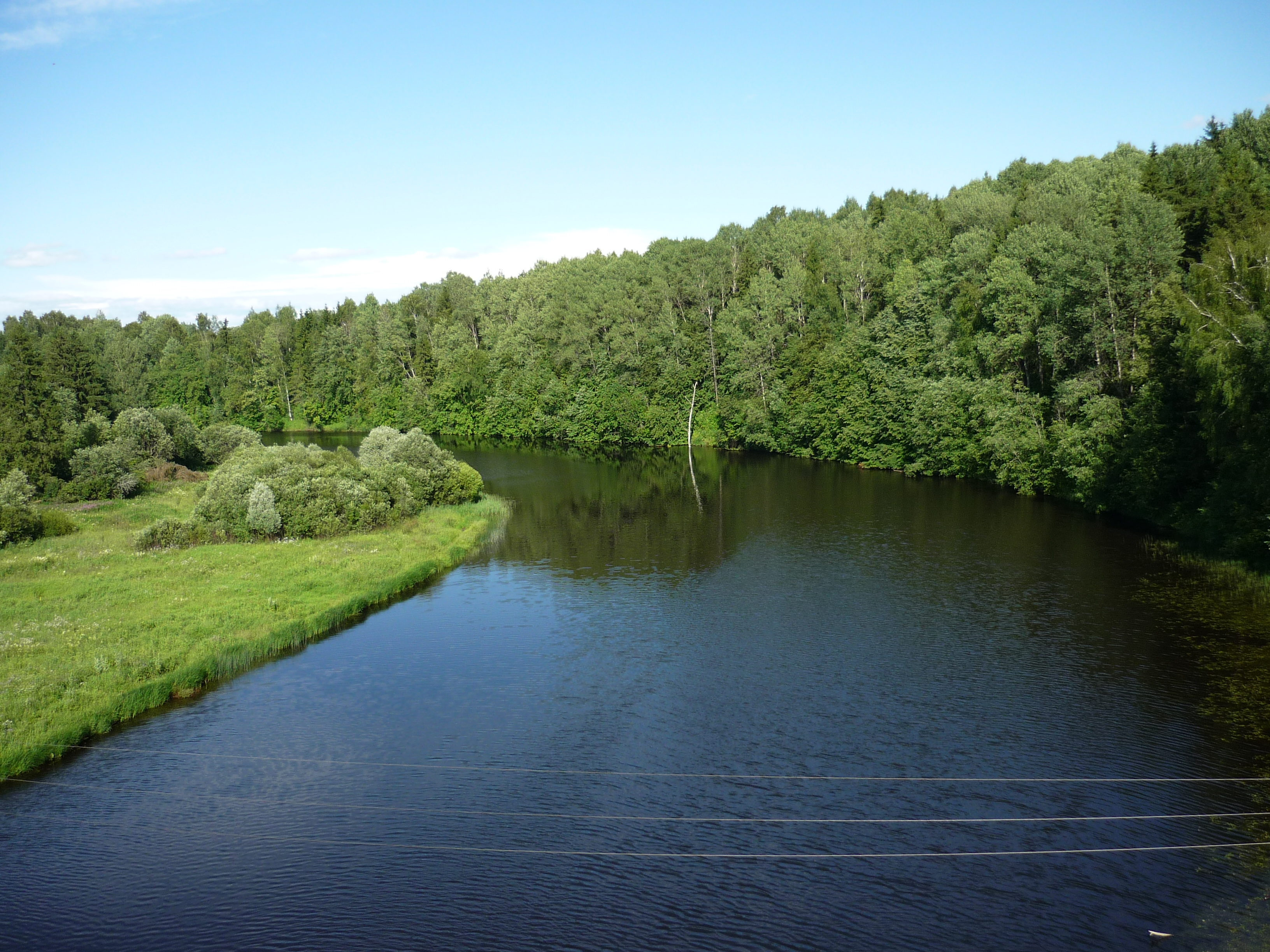 Река Осуга